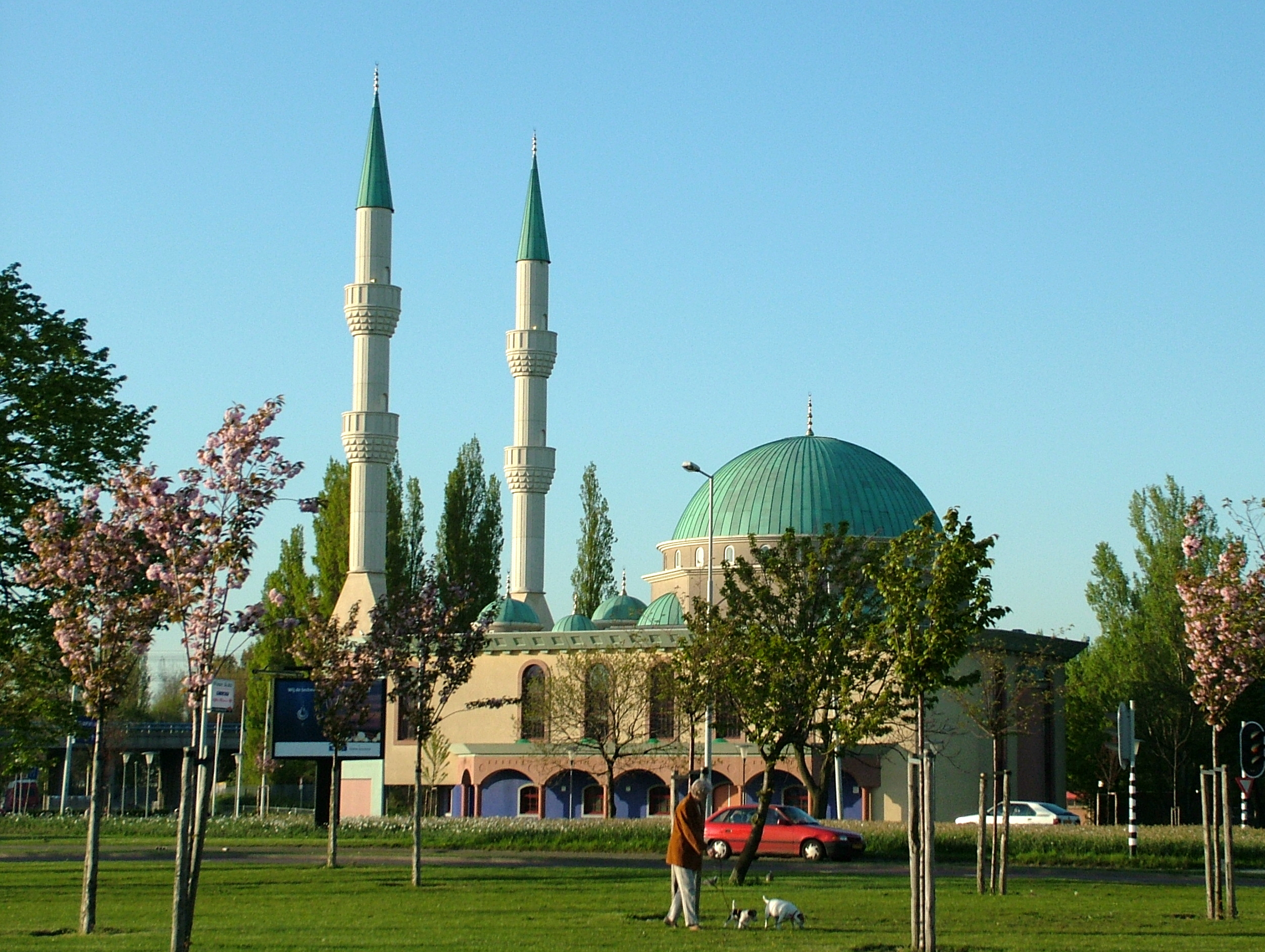 Mevlana Moschee, Rotterdam